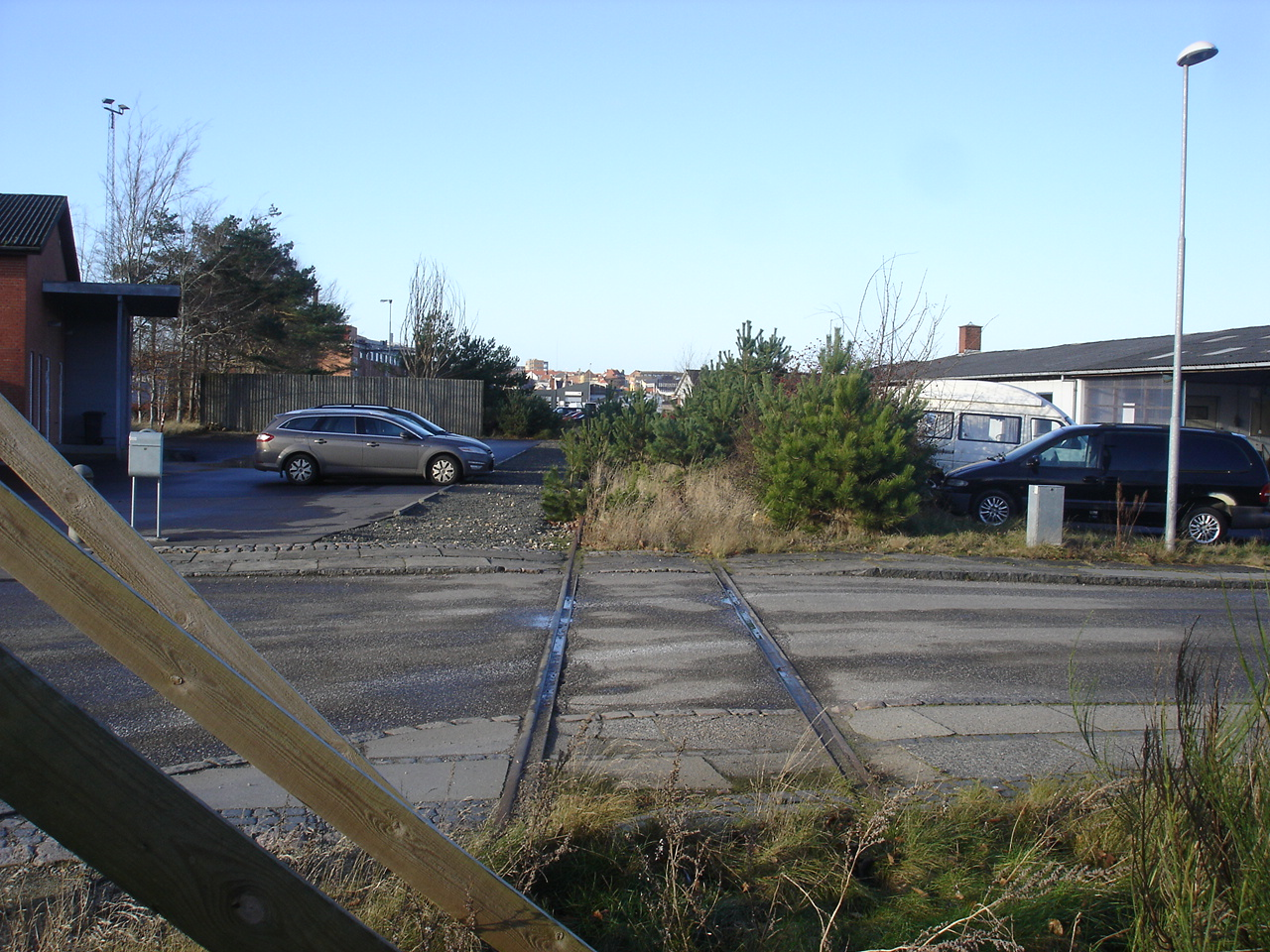 Skive Havnebane krydser Østre Fælled Vej - her startede stationsarealet 1888-1962